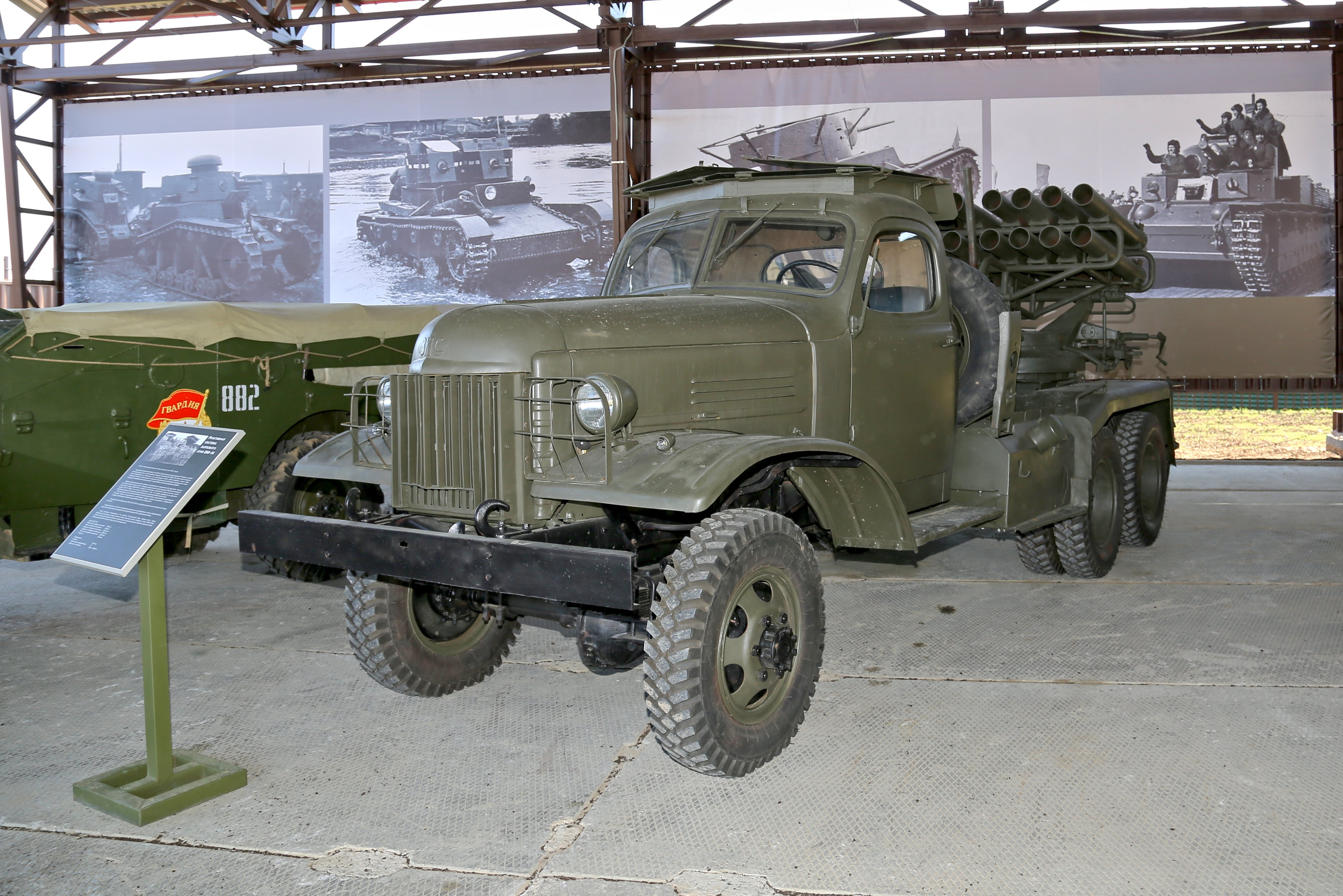 Реактивная система залпового огня БМ-14 в Музее отечественной военной истории